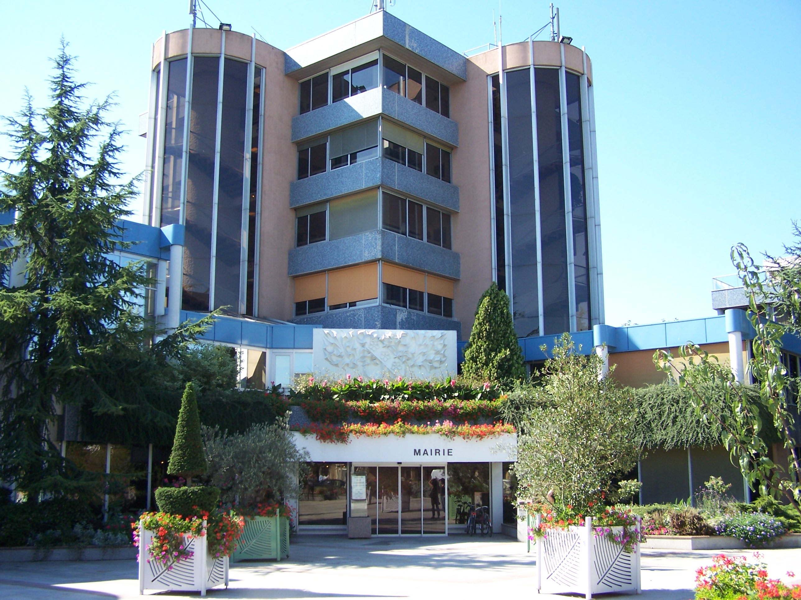 Mairie du Chesnay (Yvelines, France)